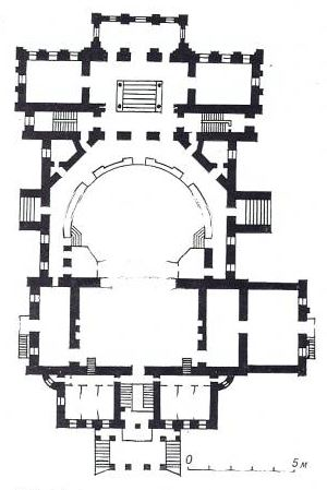 Мінск. План гарадскога тэатра паводле праекта 19 ст.